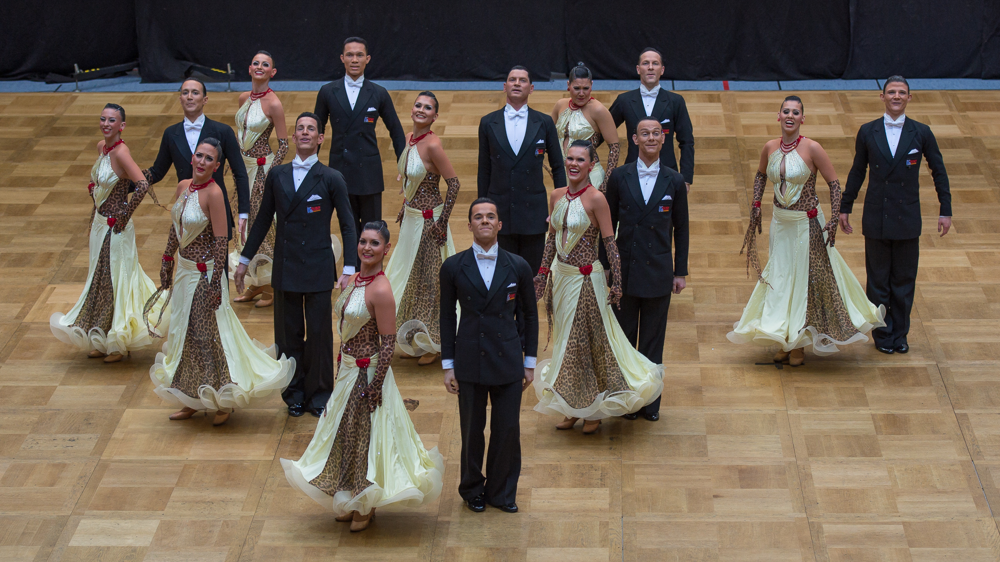 1. Bundesliga Standard Formation,Braunschweiger TSC,Formationstanz,Sporthalle am Berliner Platz,Tanzsport